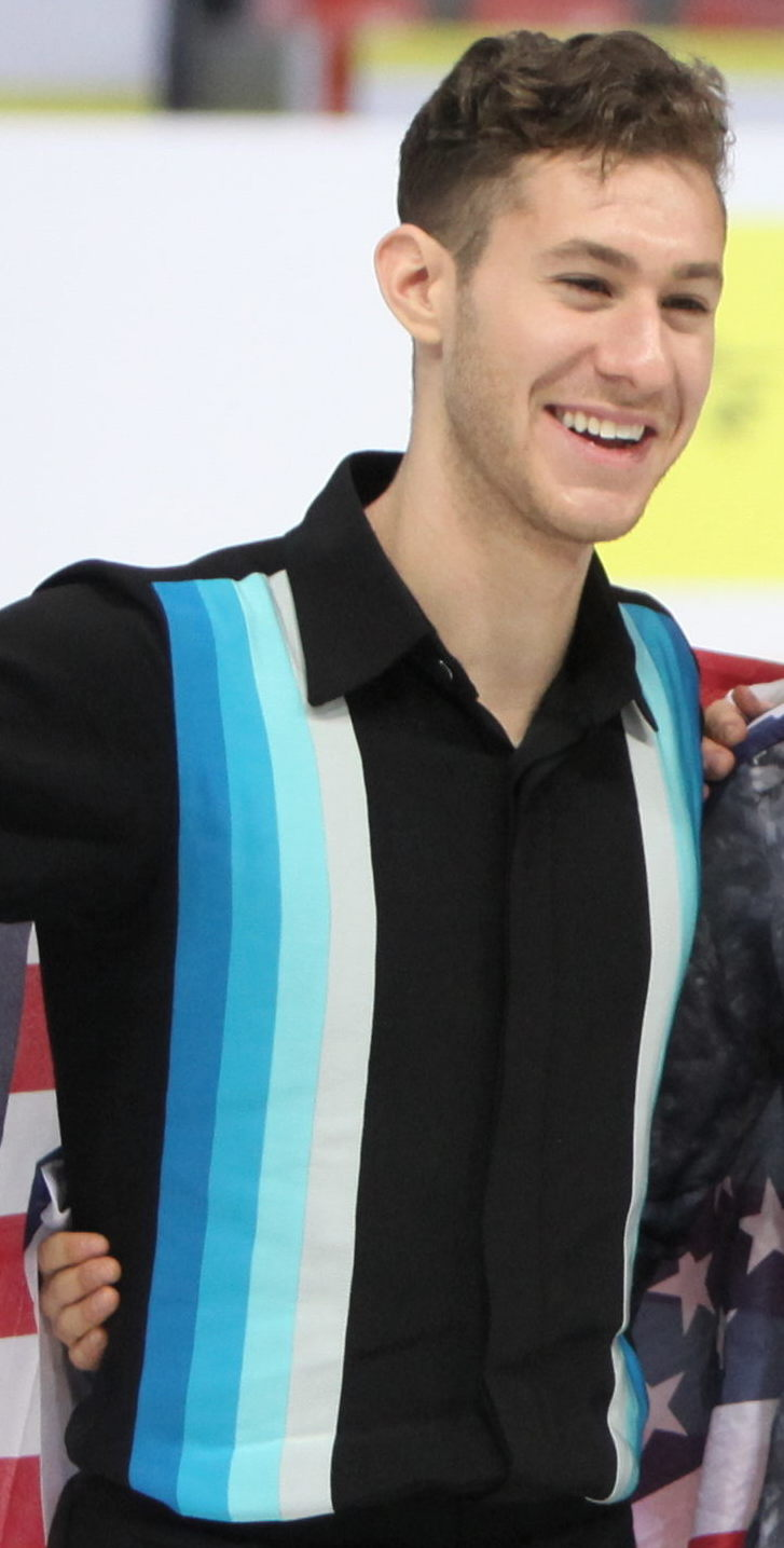 Internationaux de France de Patinage 2018, Men.